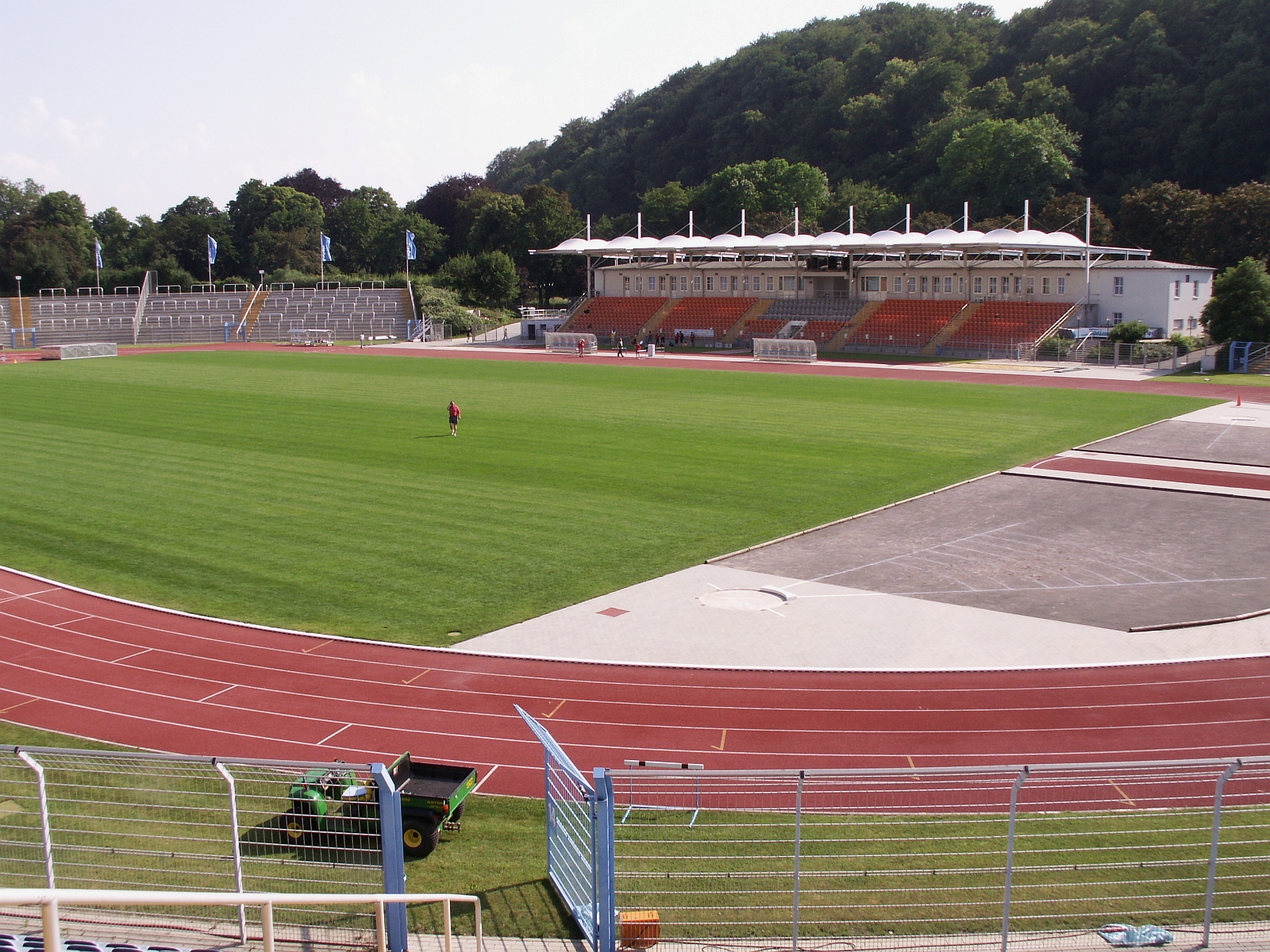 Gera Sportstätten Stadion der Freundschaft Foto Wolfgang Pehlemann Wiesbaden IMG_0346